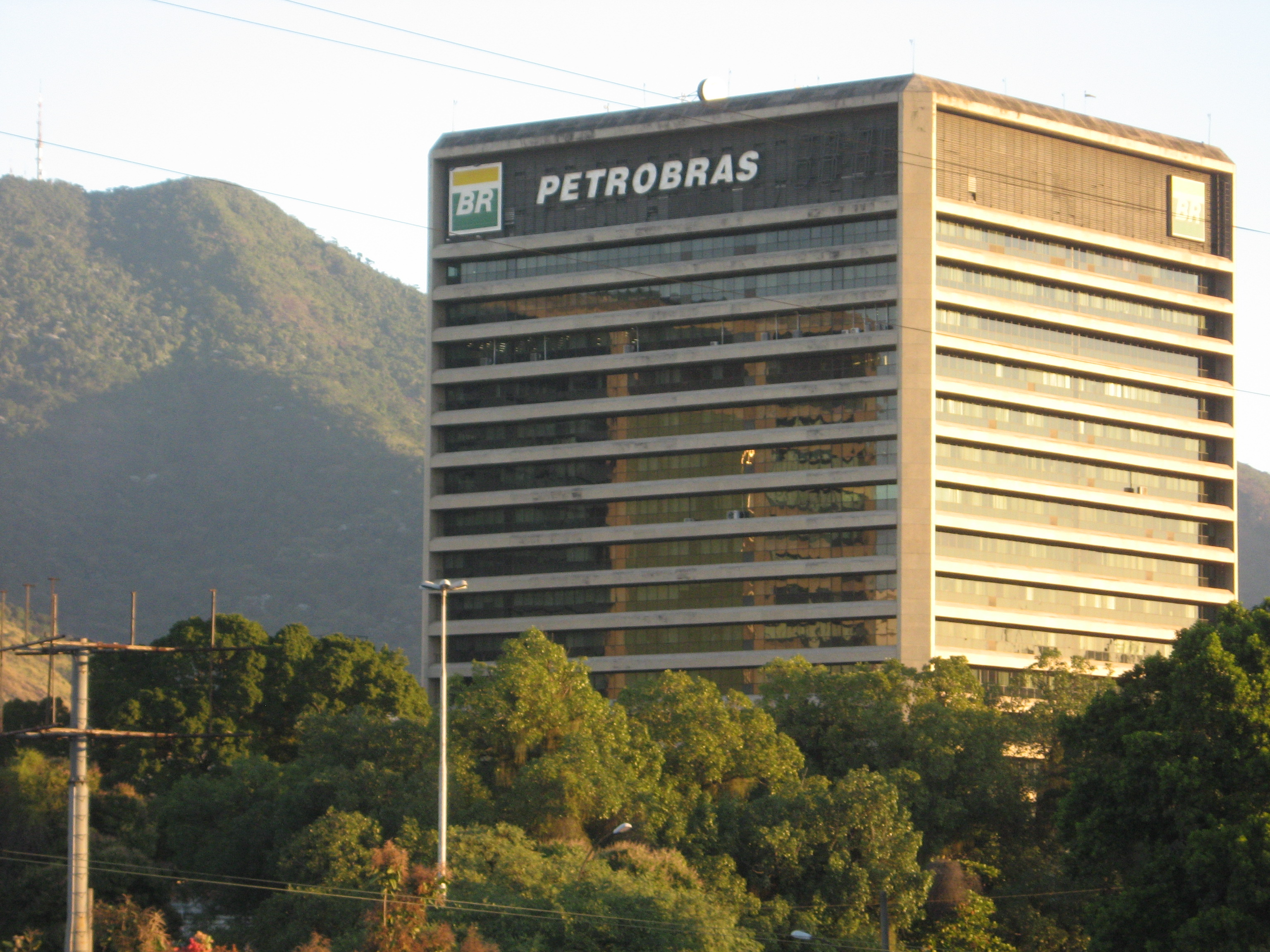 Prédio da Petrobrás localizado na Tijuca, zona norte do Rio de Janeiro.